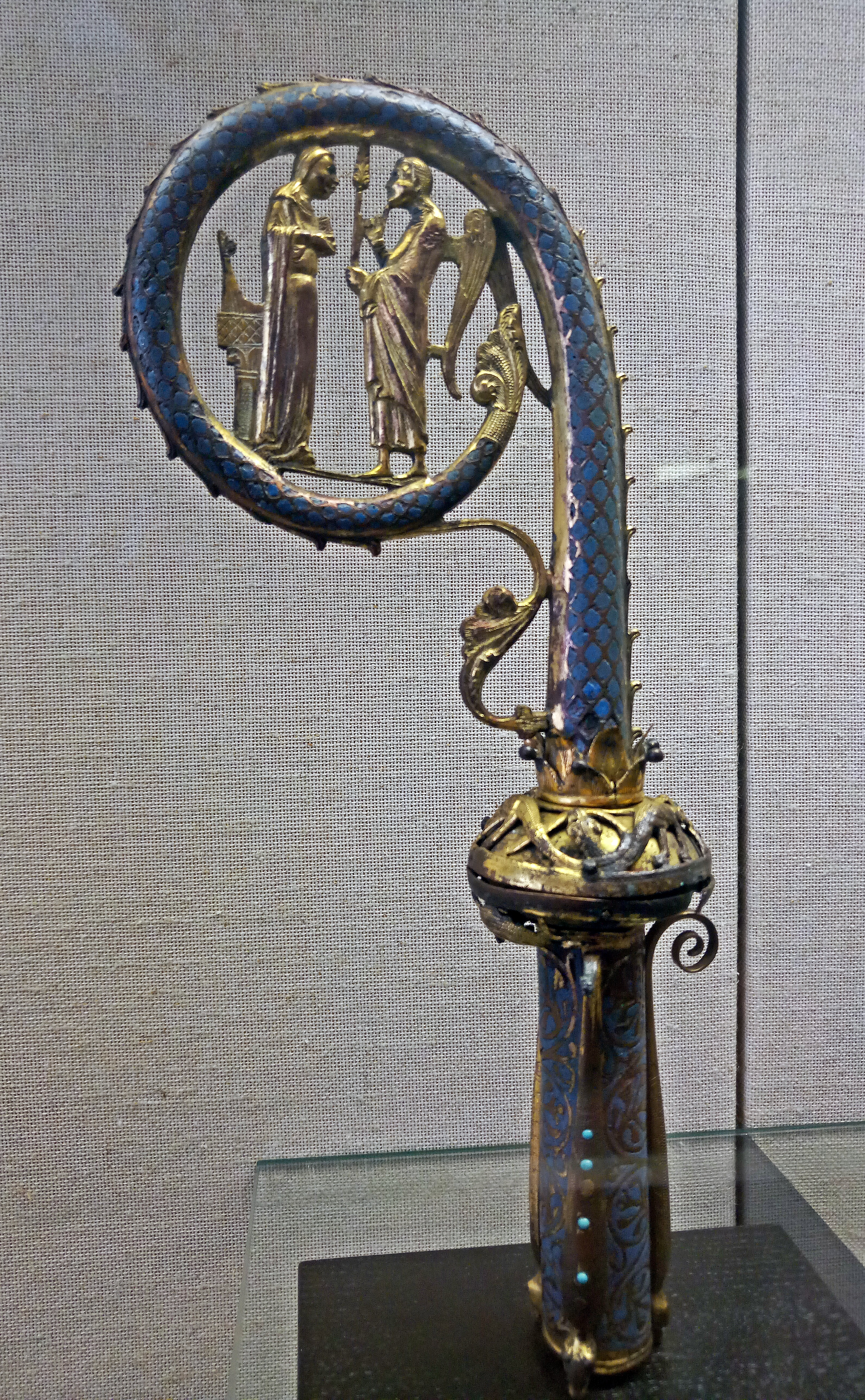 Domschatzkammer Trier, Krümme, Bischofsstab Arnold II. (+ 1259)